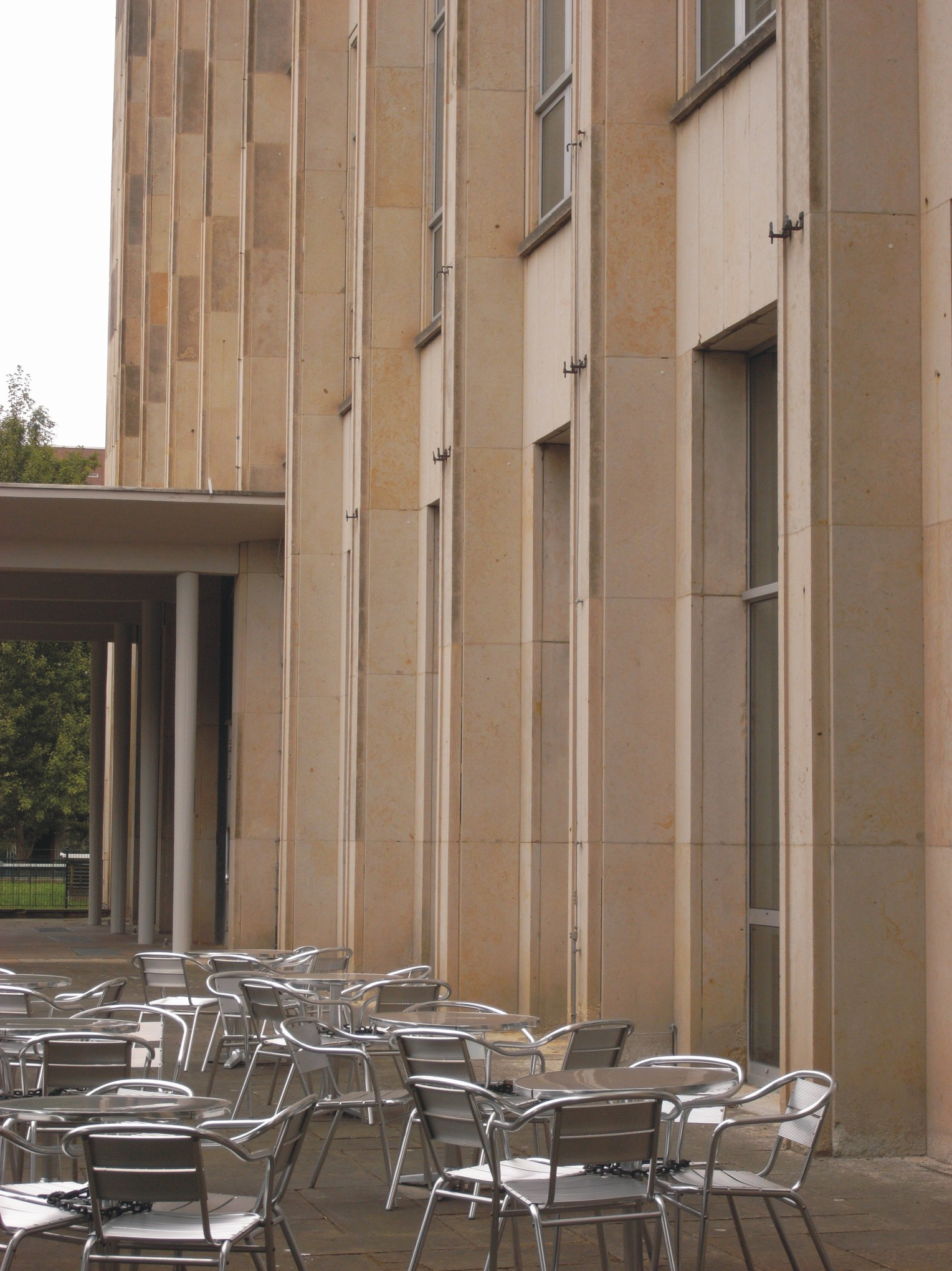 Außenterrasse der Mensa Reichenbachstraße in Dresden. Mensagebäude der ehemaligen Hochschule für Verkehrswesen „Friedrich List“. Heute Mensa der Hochschule für Technik und Wirtschaft.